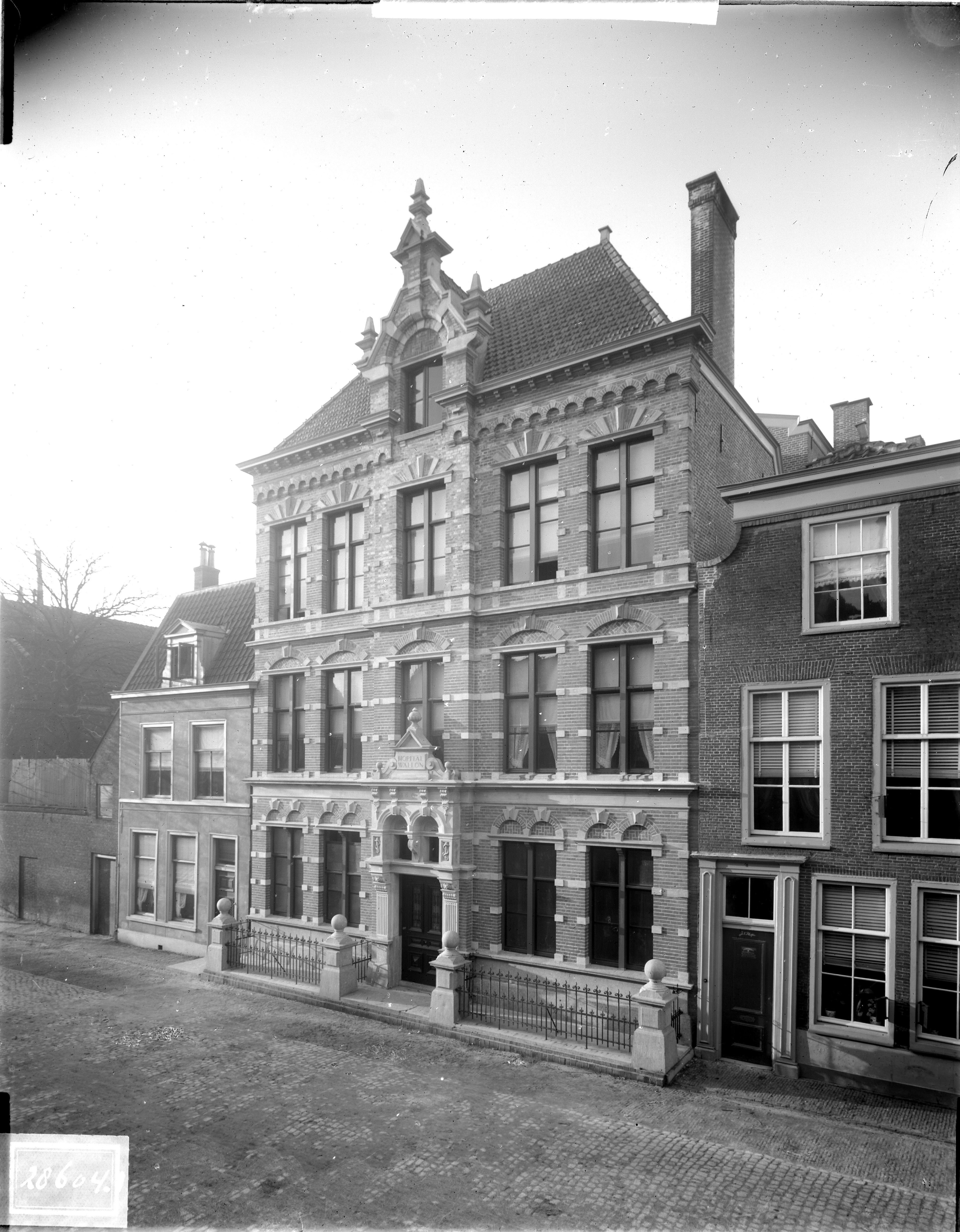 Gezicht op het Waals Ziekenhuis aan de Papengracht.